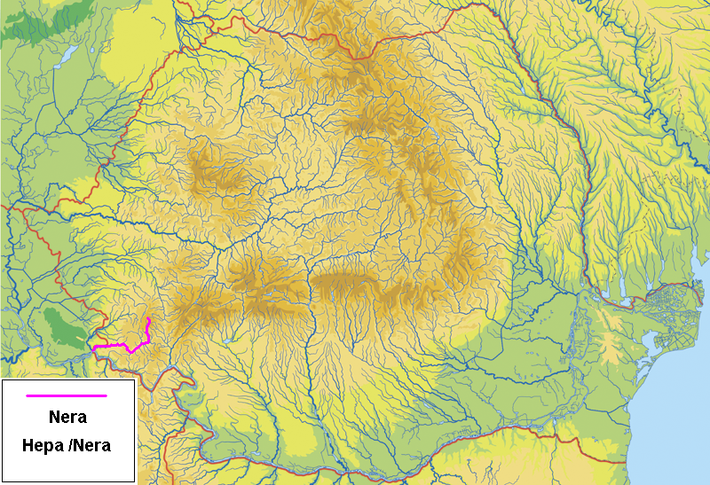 Nera river